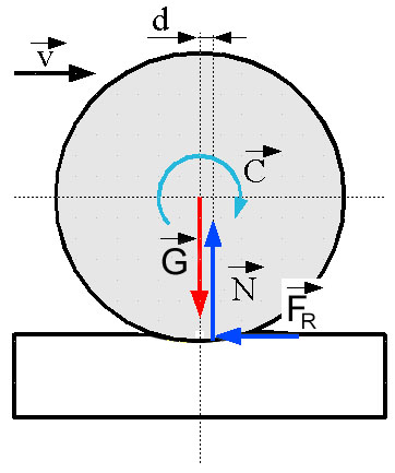 Roulement3